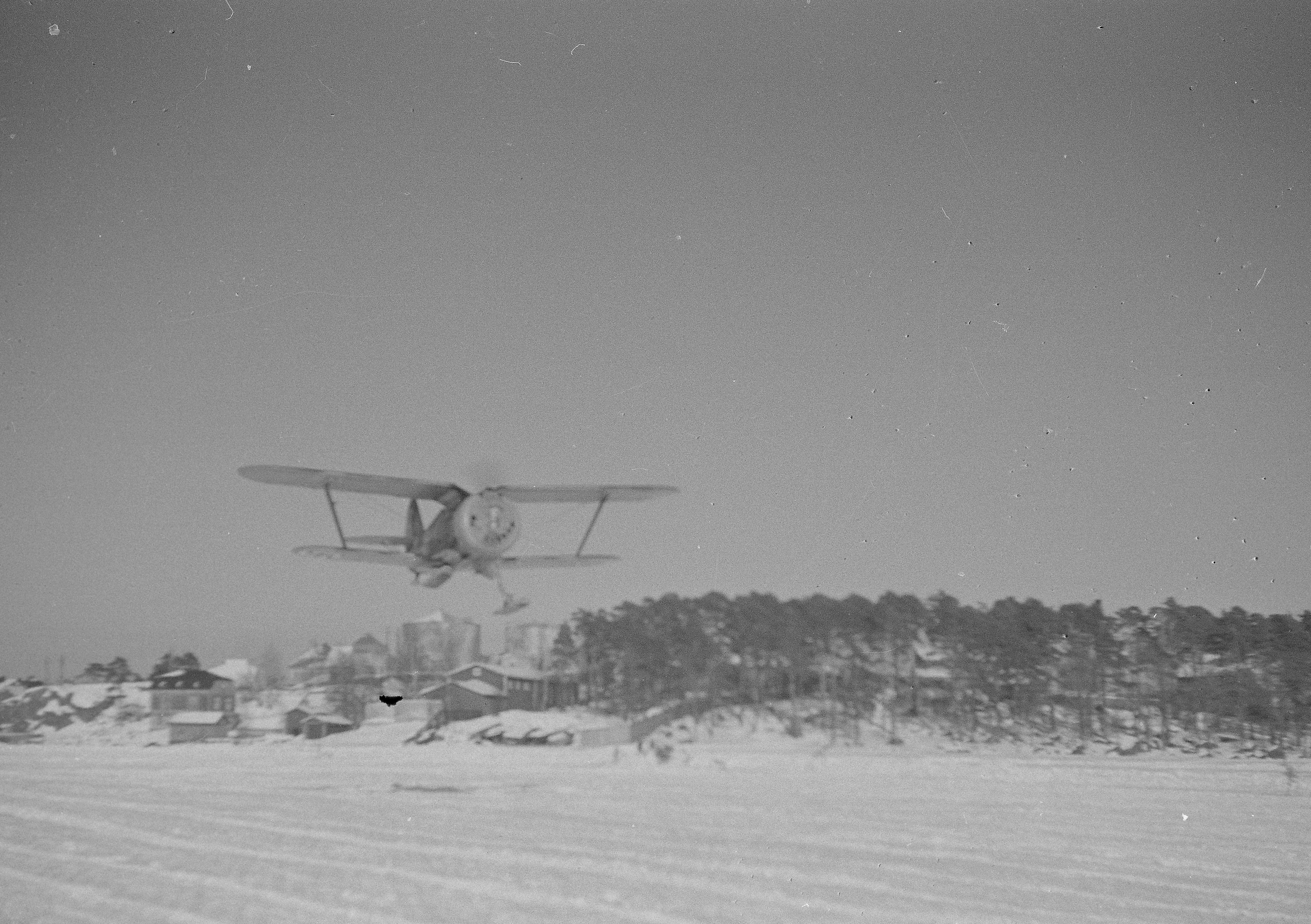 VH-tyyppinen hävittäjä nousee ilmaan Kotkan kentältä. (Kone Polikarpov I-153)